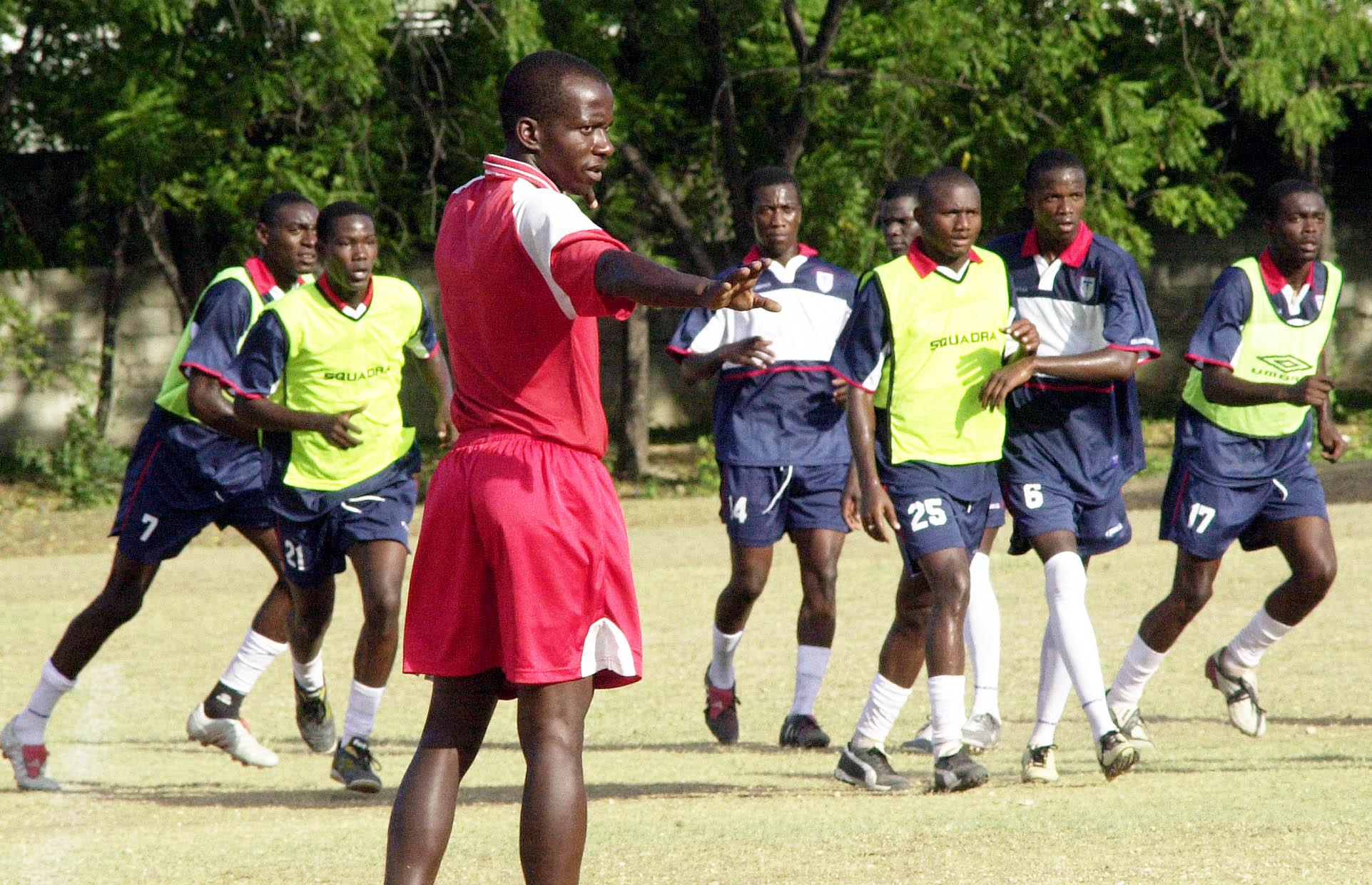 Porto-Príncipe, Haiti - O Técnico da Seleção do Haiti, Carlo Marcelin, comanda o treino do time.